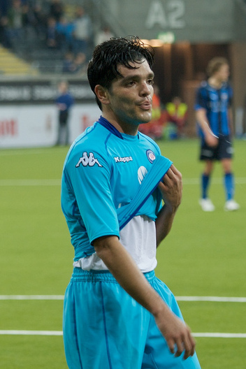 Juan Fuenmayor